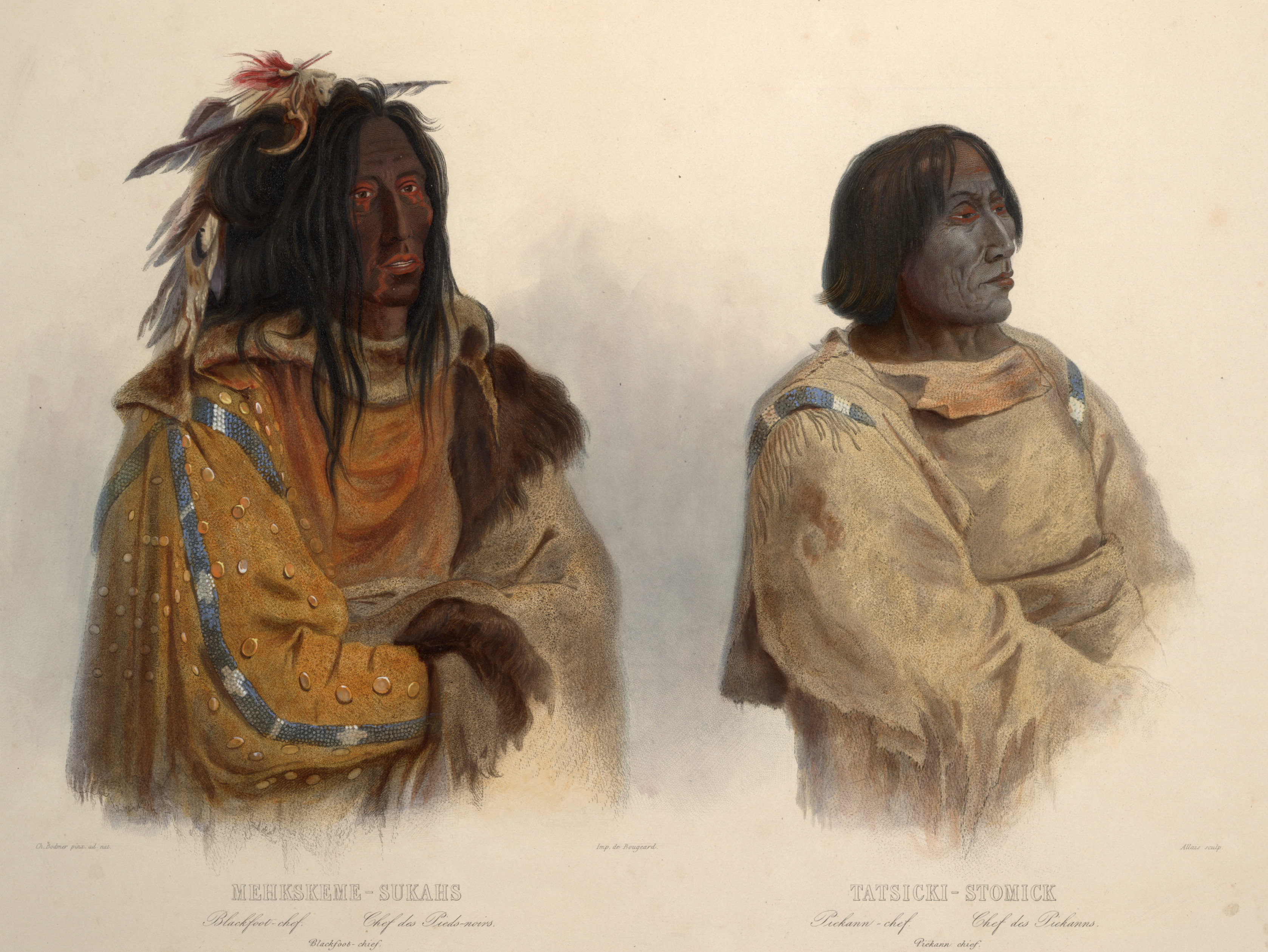 Blackfoot chief and Peikann chief